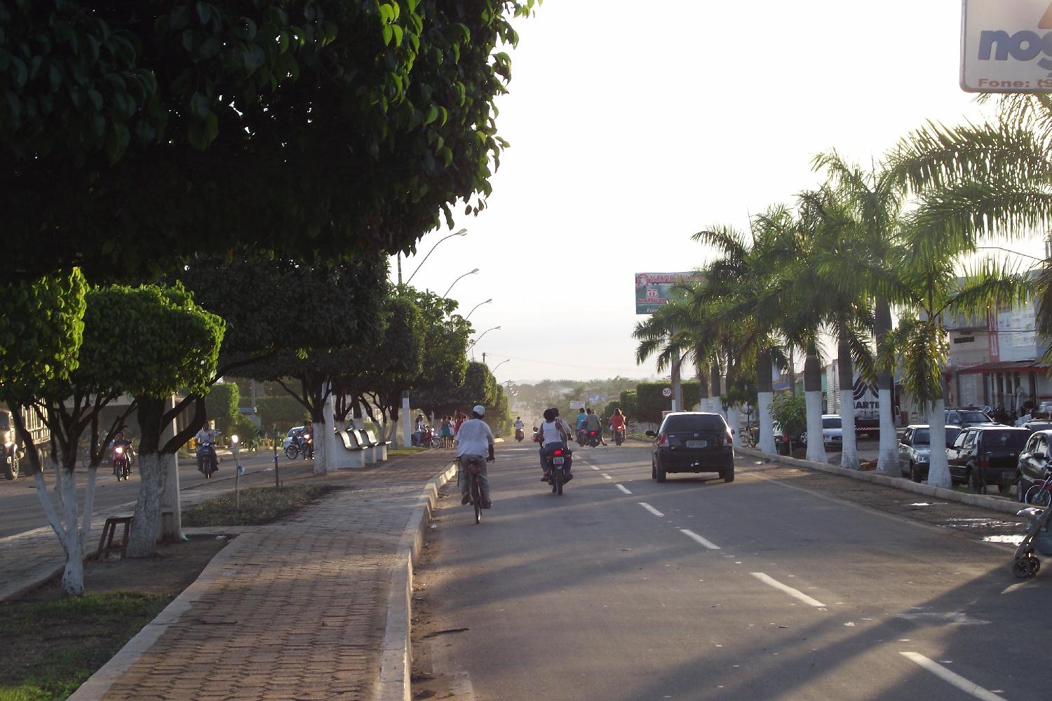 Rondon do Pará, estado do Pará, Brasil.